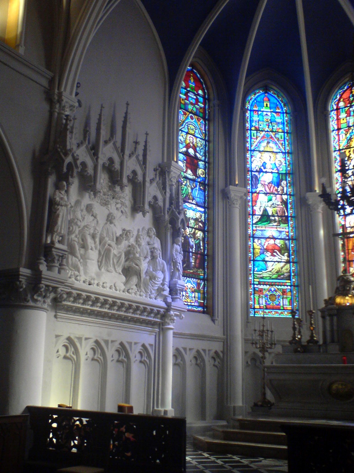 Haut relief du choeur de l'église Saint-Gilles à Watten